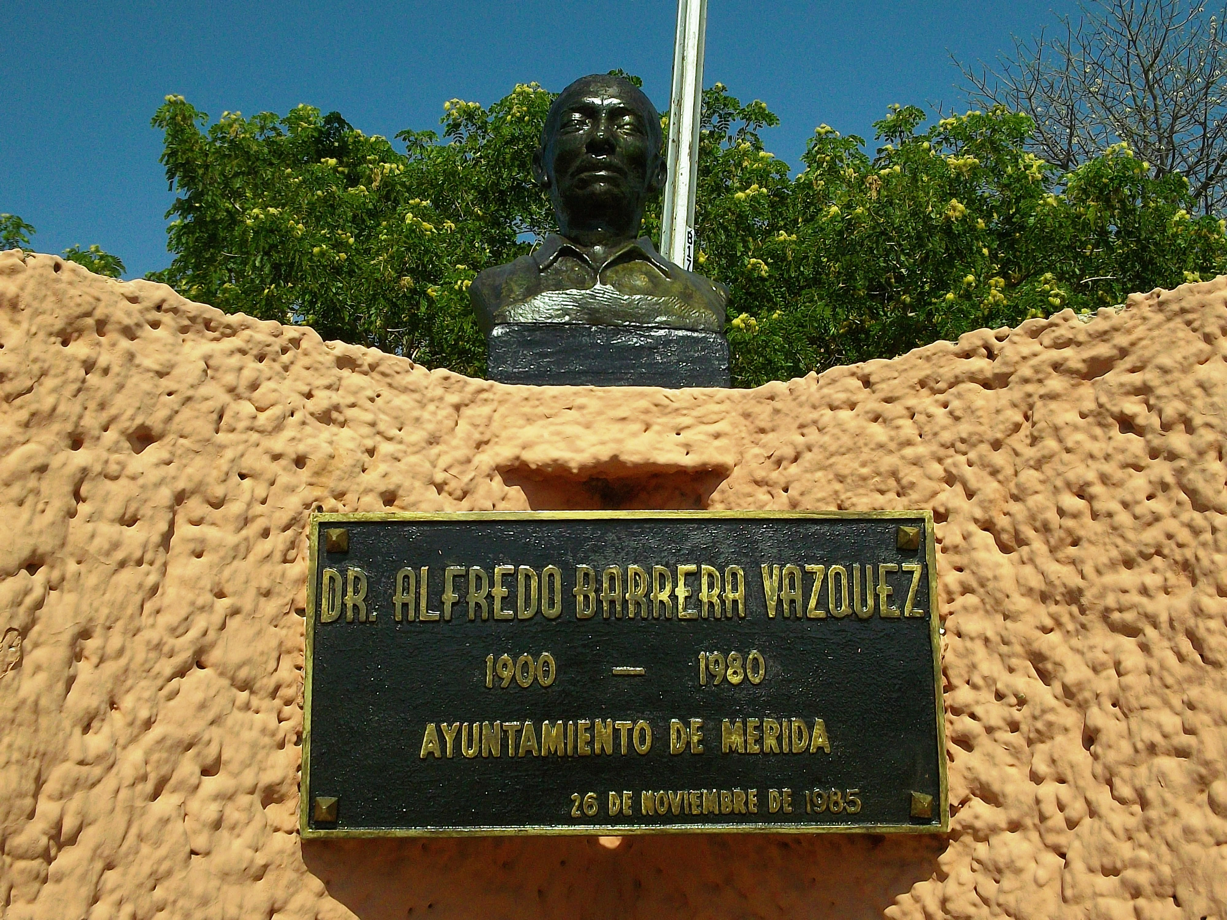 Busto de Alfredo Barrera Vásquez, Mérida, Yucatán.